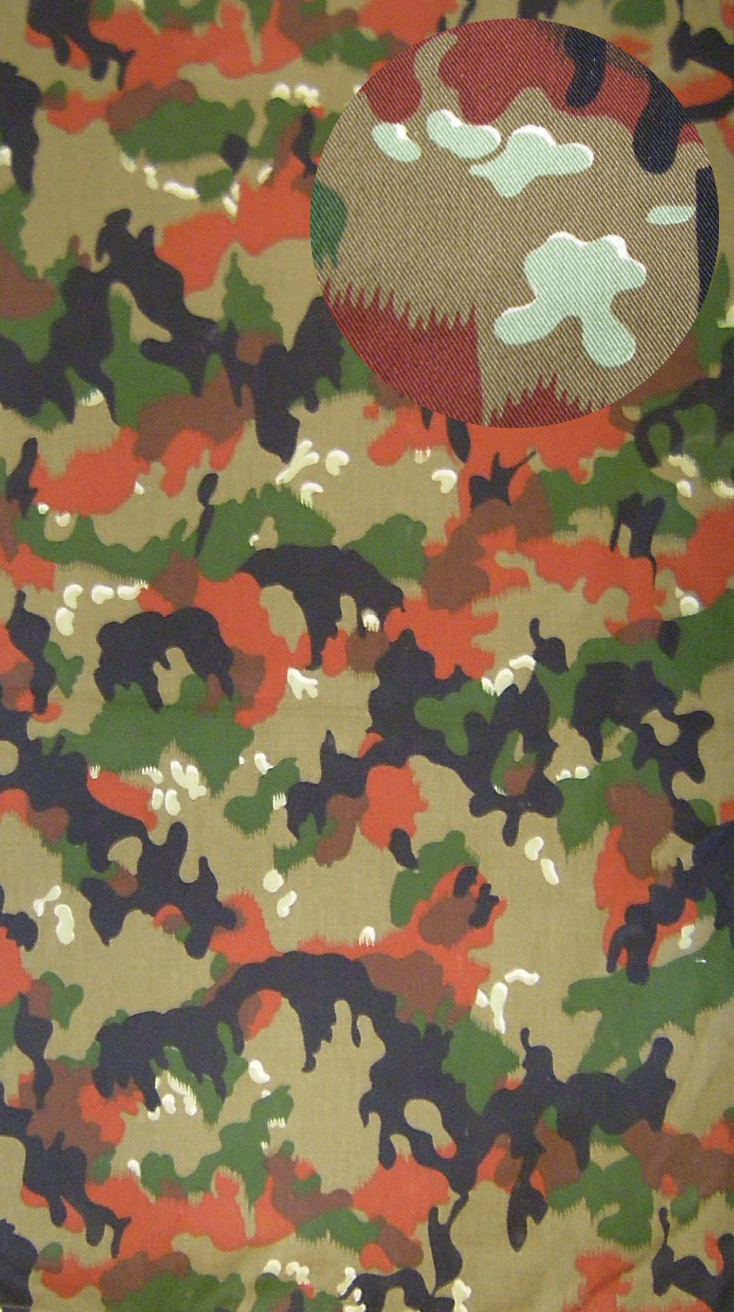 Camouflage Alpenflage, armée suisse.